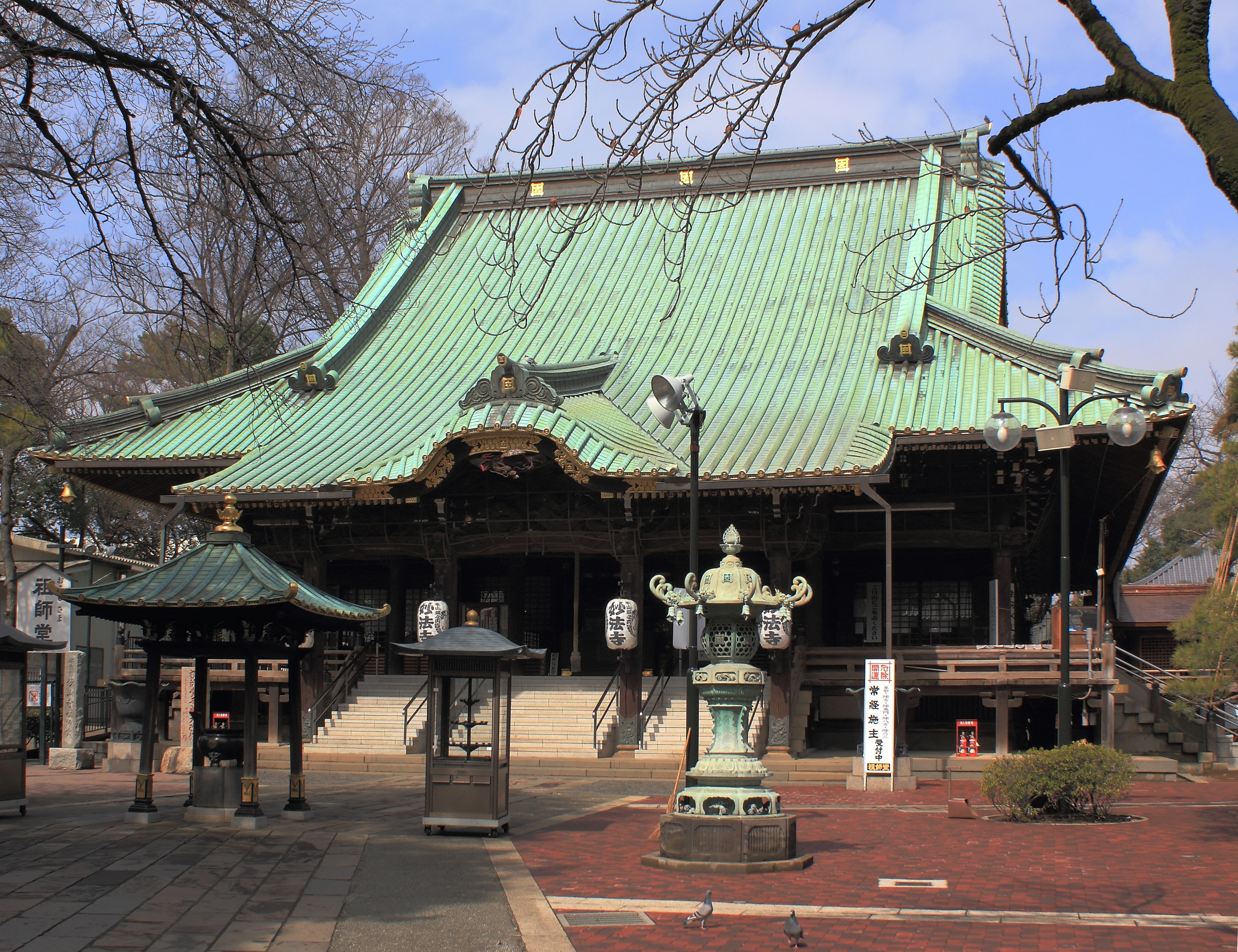 妙法寺祖師堂（東京都指定有形文化財・東京都杉並区）